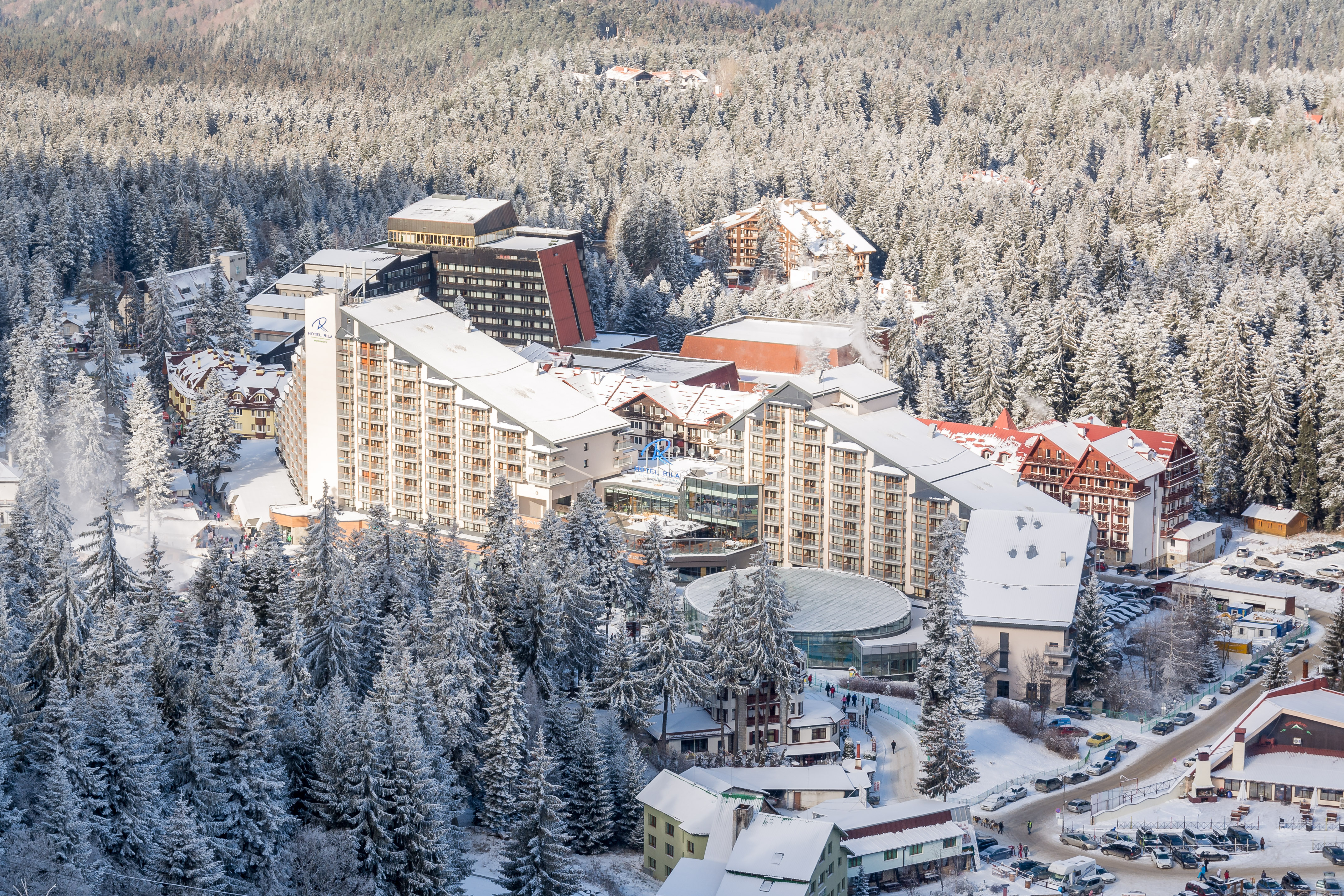 Боровец, 31.12.2015